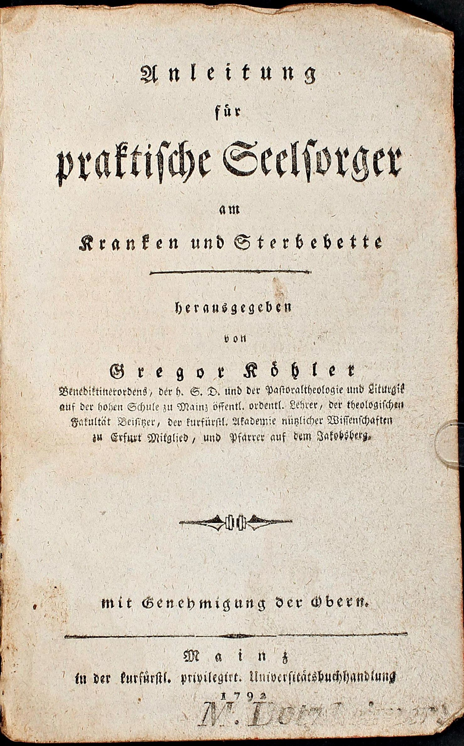 Buchtitelblatt von Pater Gregor Köhler OSB, 1792